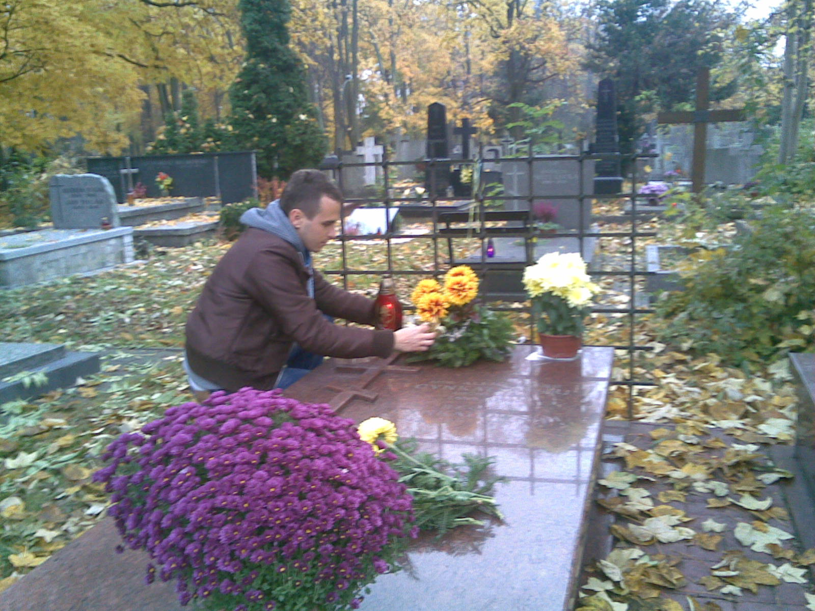 Grobowiec Cynkałowskich 2011